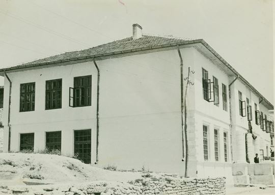 Средно политехническо училище „Христо Ботев“ в Балчик.